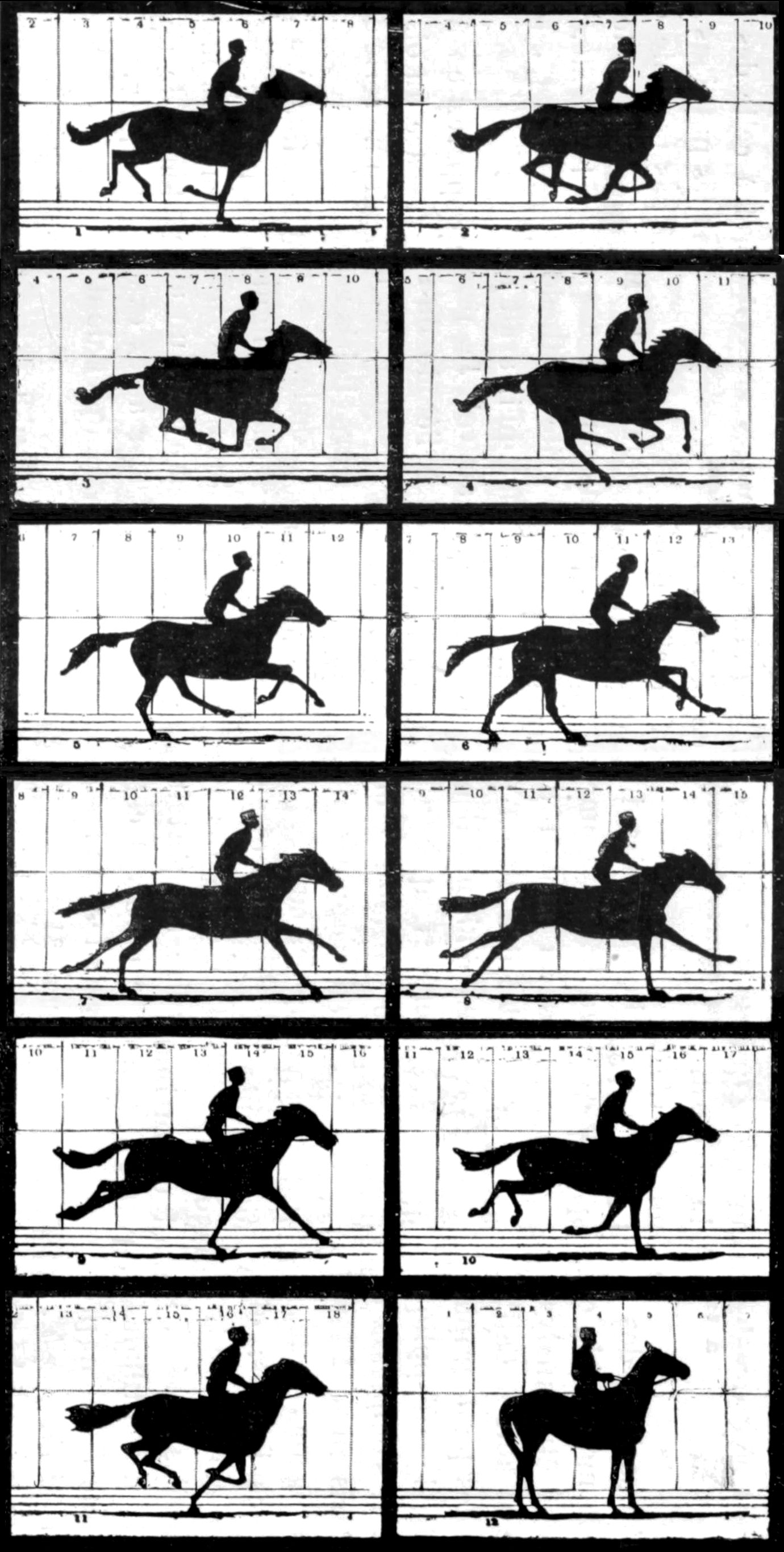 La méthode graphique dans les sciences expérimentales et principalement en physiologie et en médecine, livre, seconde édition de 1885.